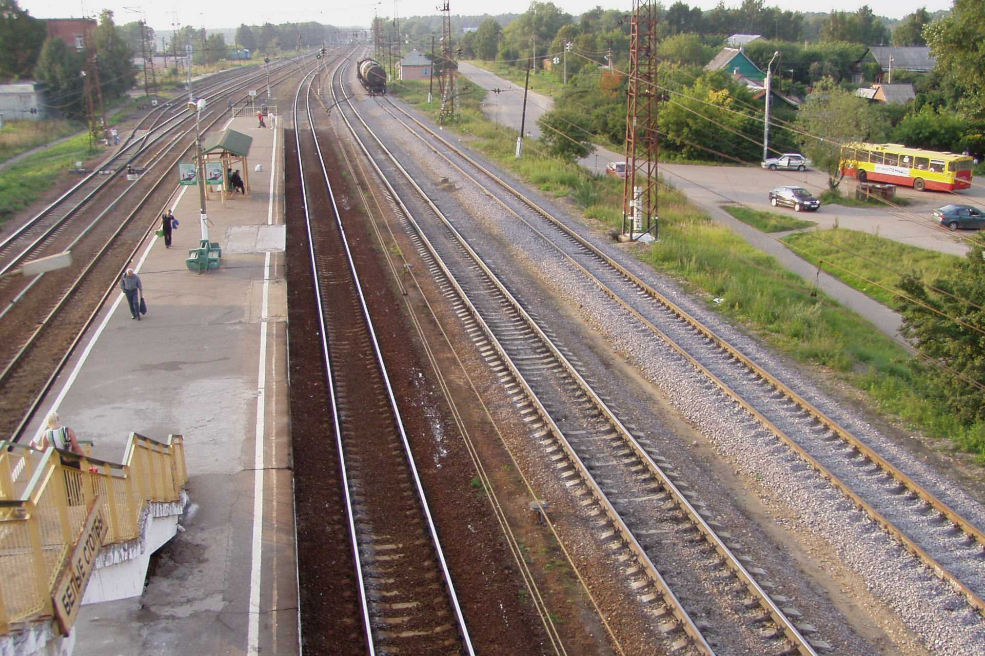 Белые Столбы (станция), Moscow Railway